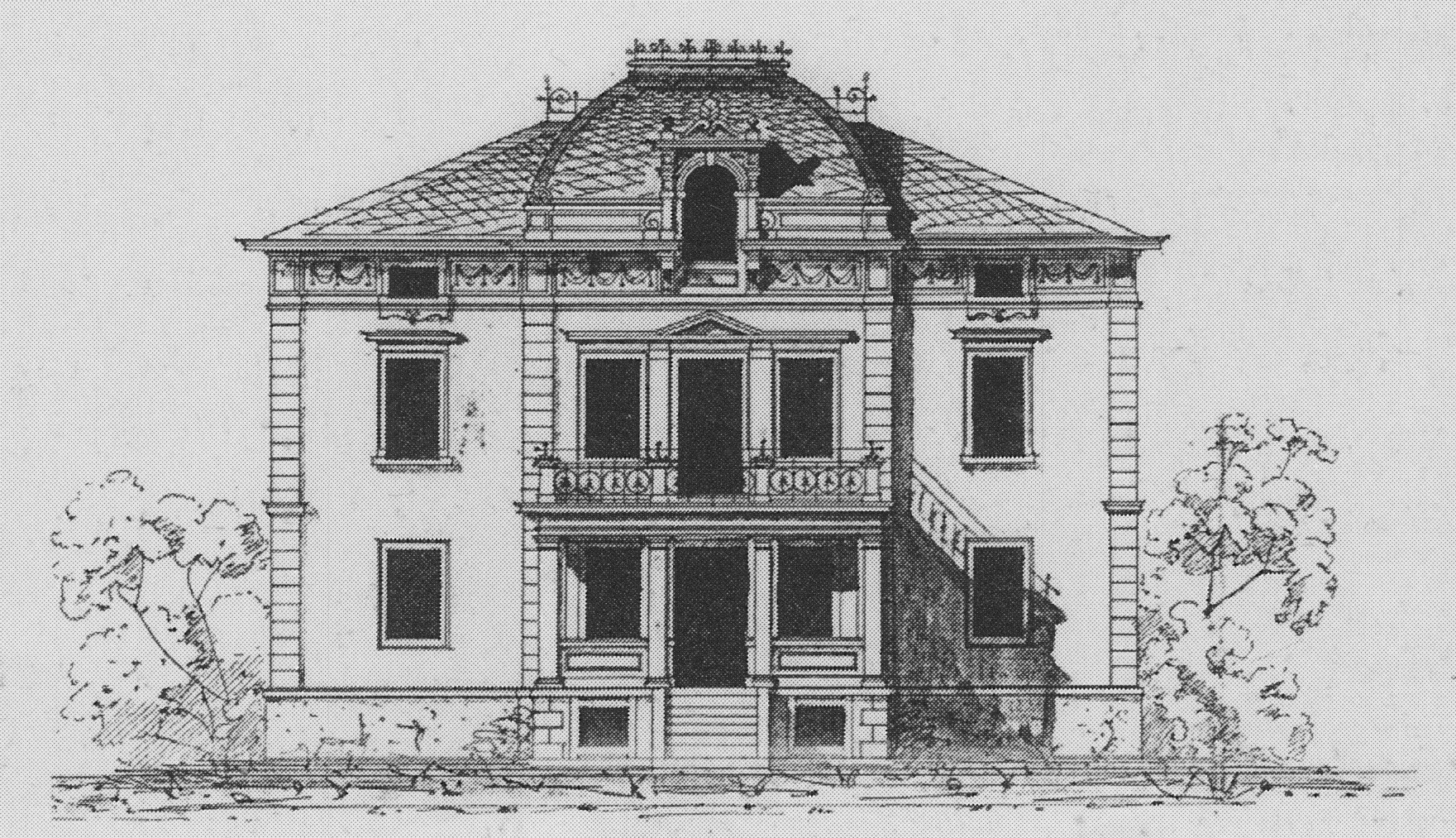 Radebeul Villa Obere Bergstraße 1 Bauzeichnung 1890 Gartenansicht